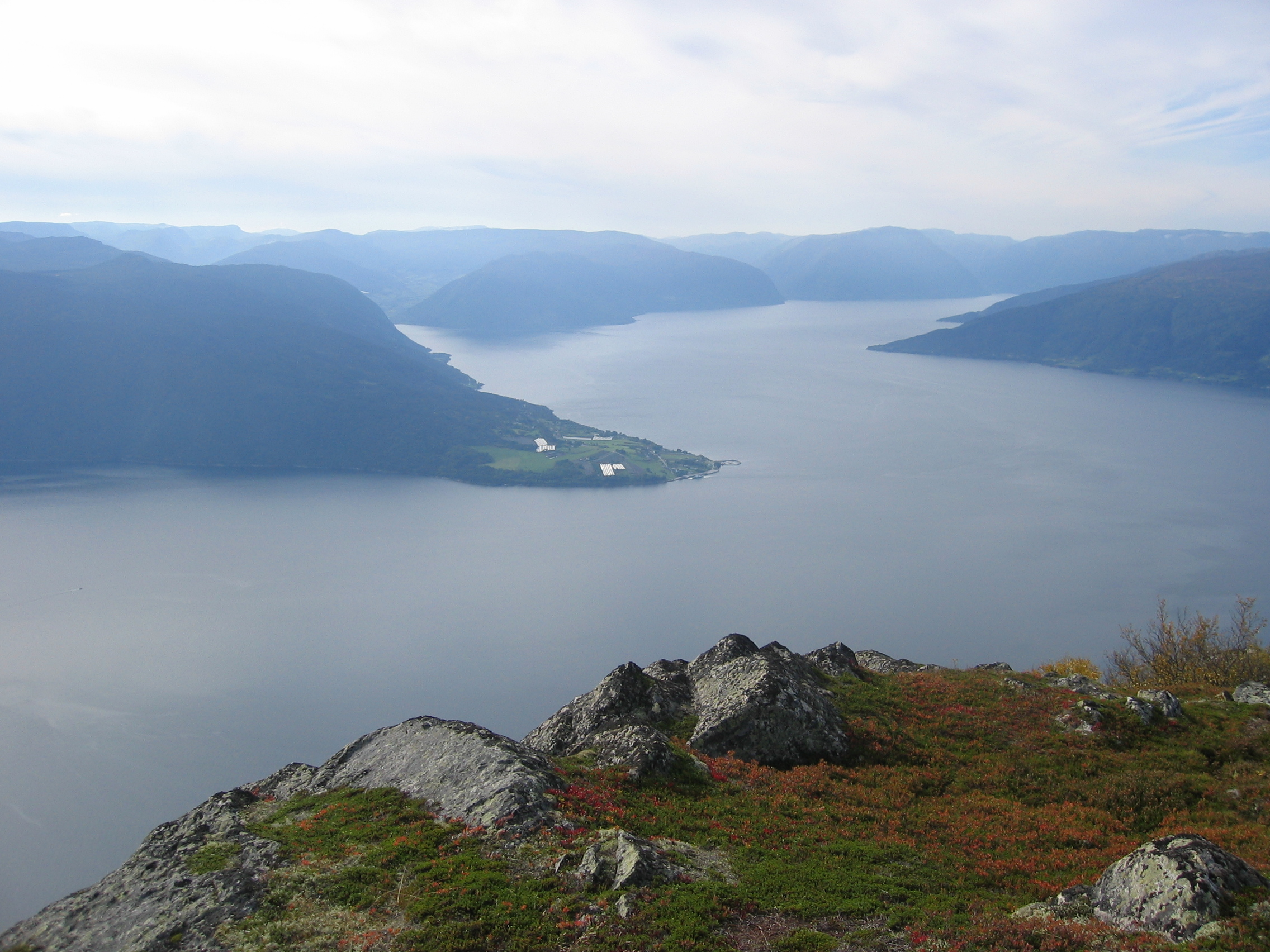 Sognefjorden. Vangsnes i Vik kommune i midten.